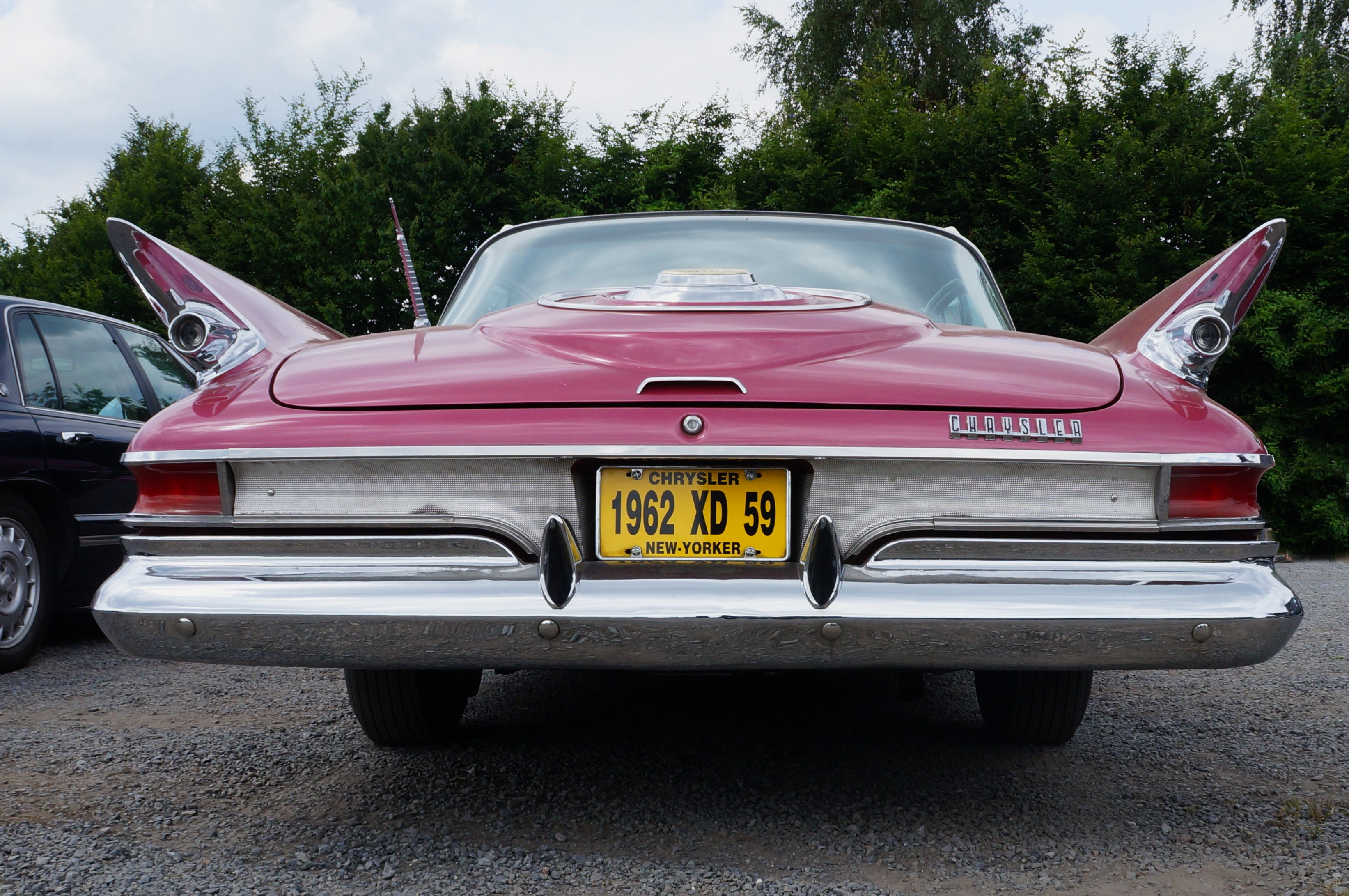 Chrysler New Yorker (1961), Duke's Club.- Juin 2014 Villeneuve-d'Ascq,France